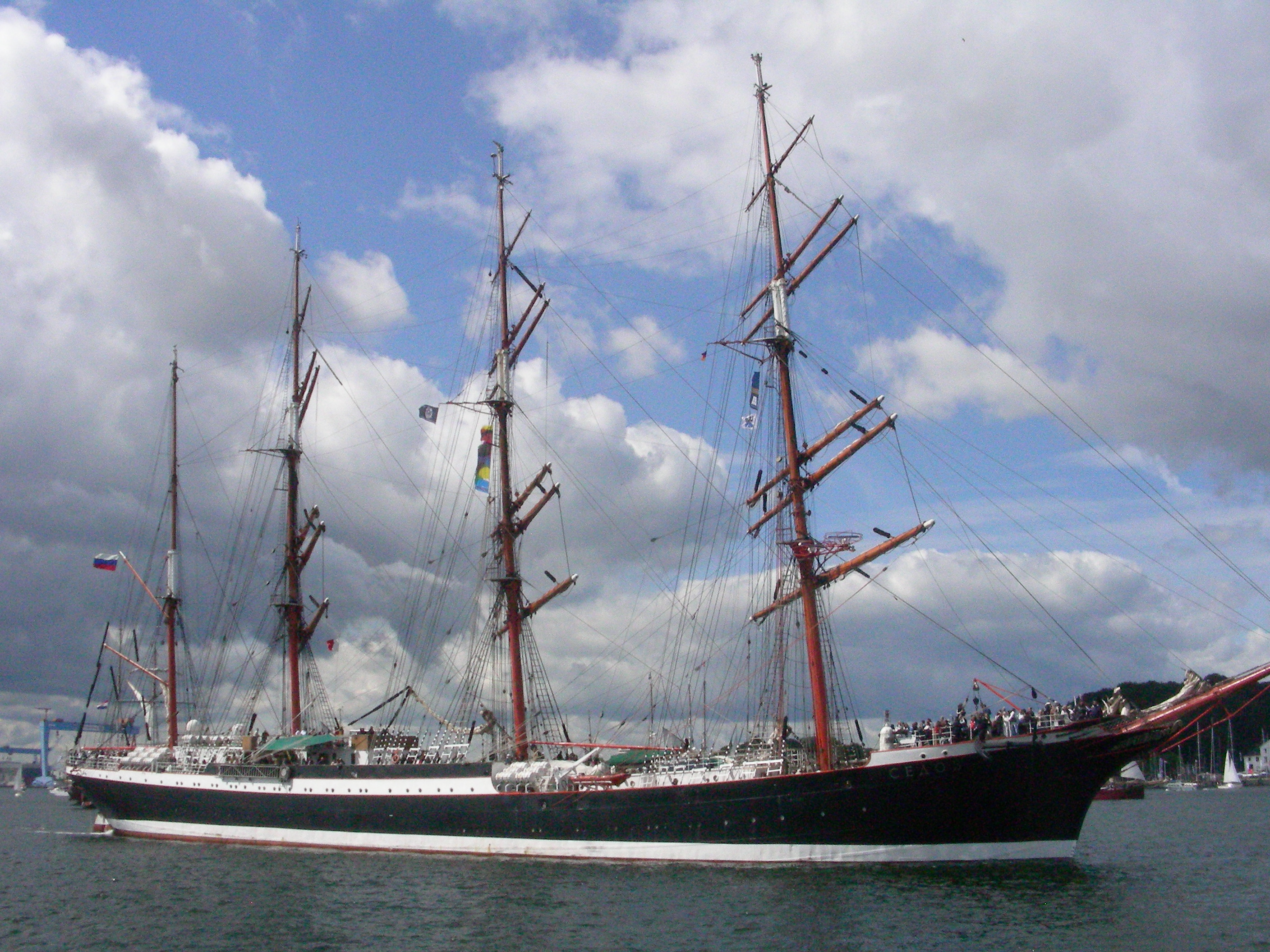 Viermaster Sedov bei der Kieler Woche 2011